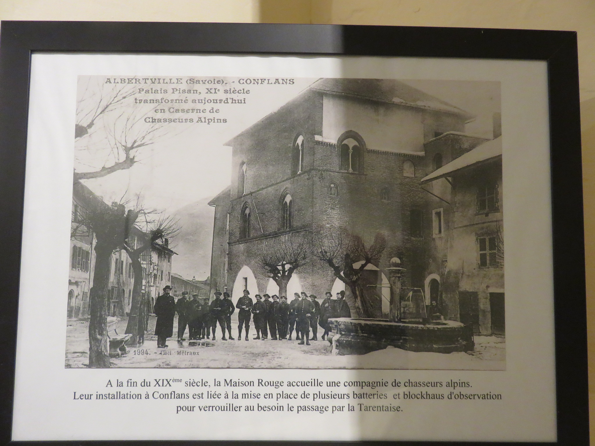 Musée d'art et d'histoire de Conflans : Maison Rouge de Conflans, ancien palais Pisan du XIe siècle, et ancienne caserne de chasseurs alpins, actuel musée d'art et d'histoire de Conflans / Alberville